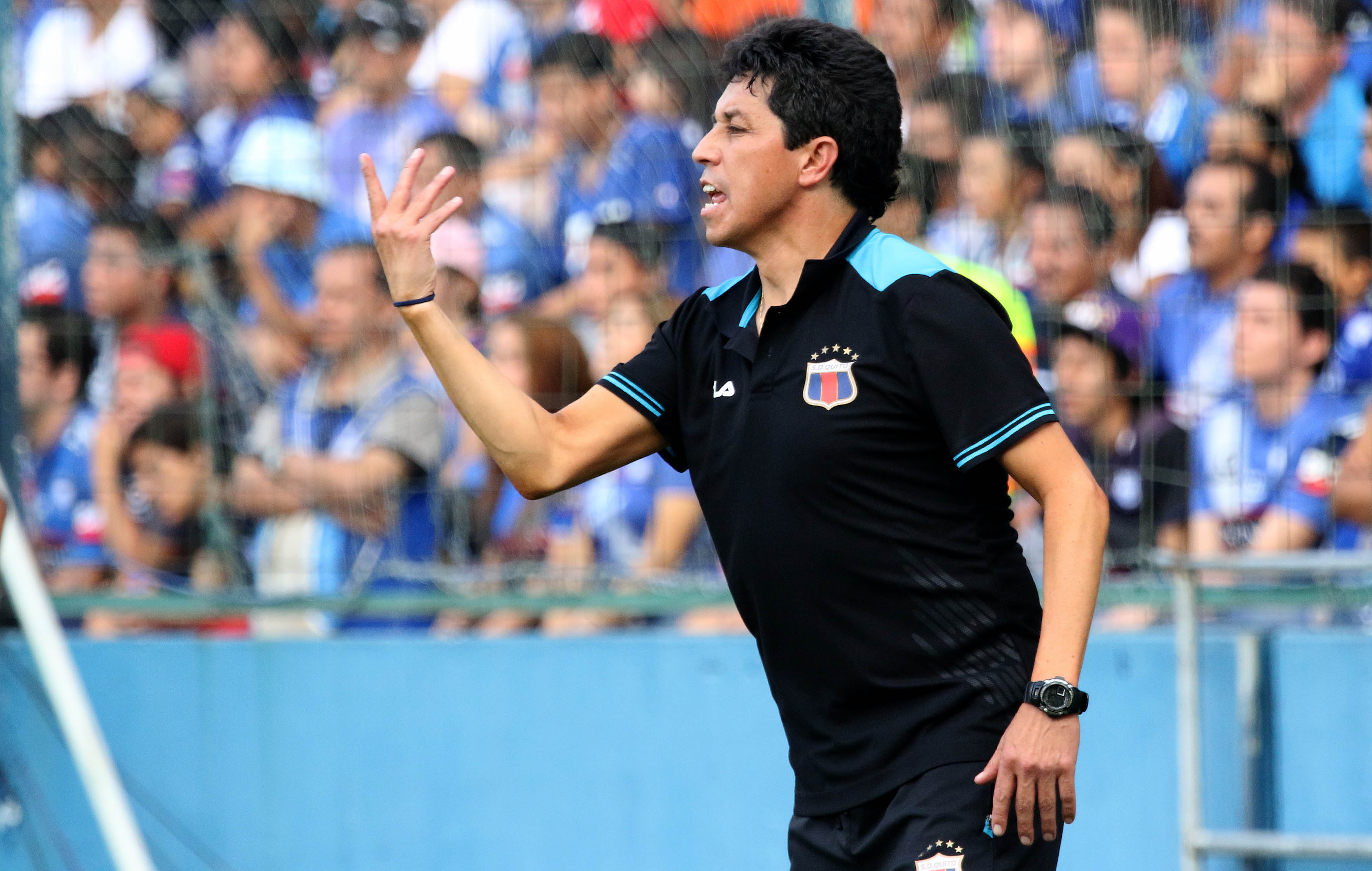 Guayaquil, 19 de jul del 2015 (Andes).-Paúl Vélez DT. del deportivo Quito dirige durante el encuentro frente al Emelec en el estadio Capwell Foto:César Muñoz/Andes